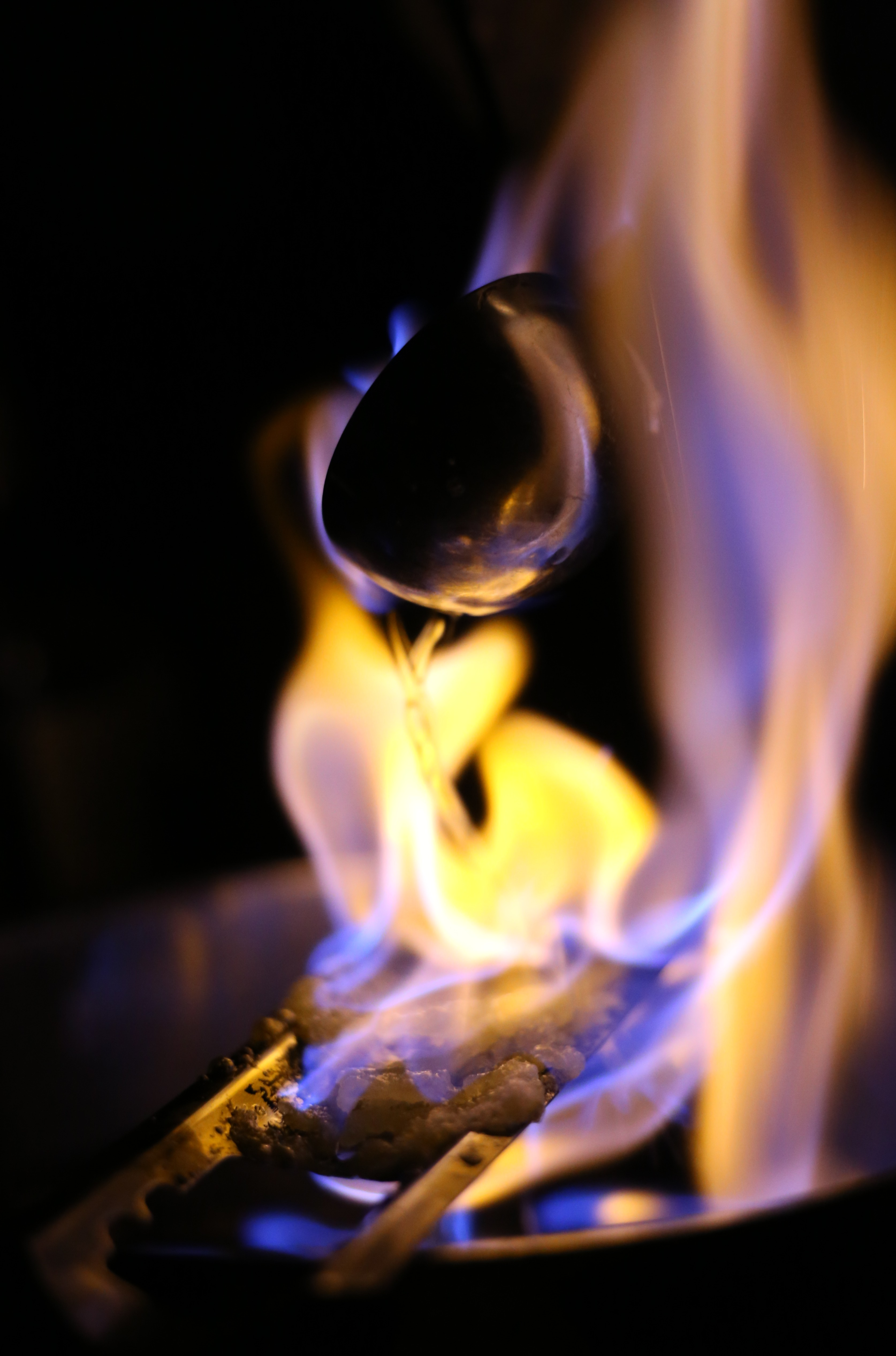 Feuerzangenbowle